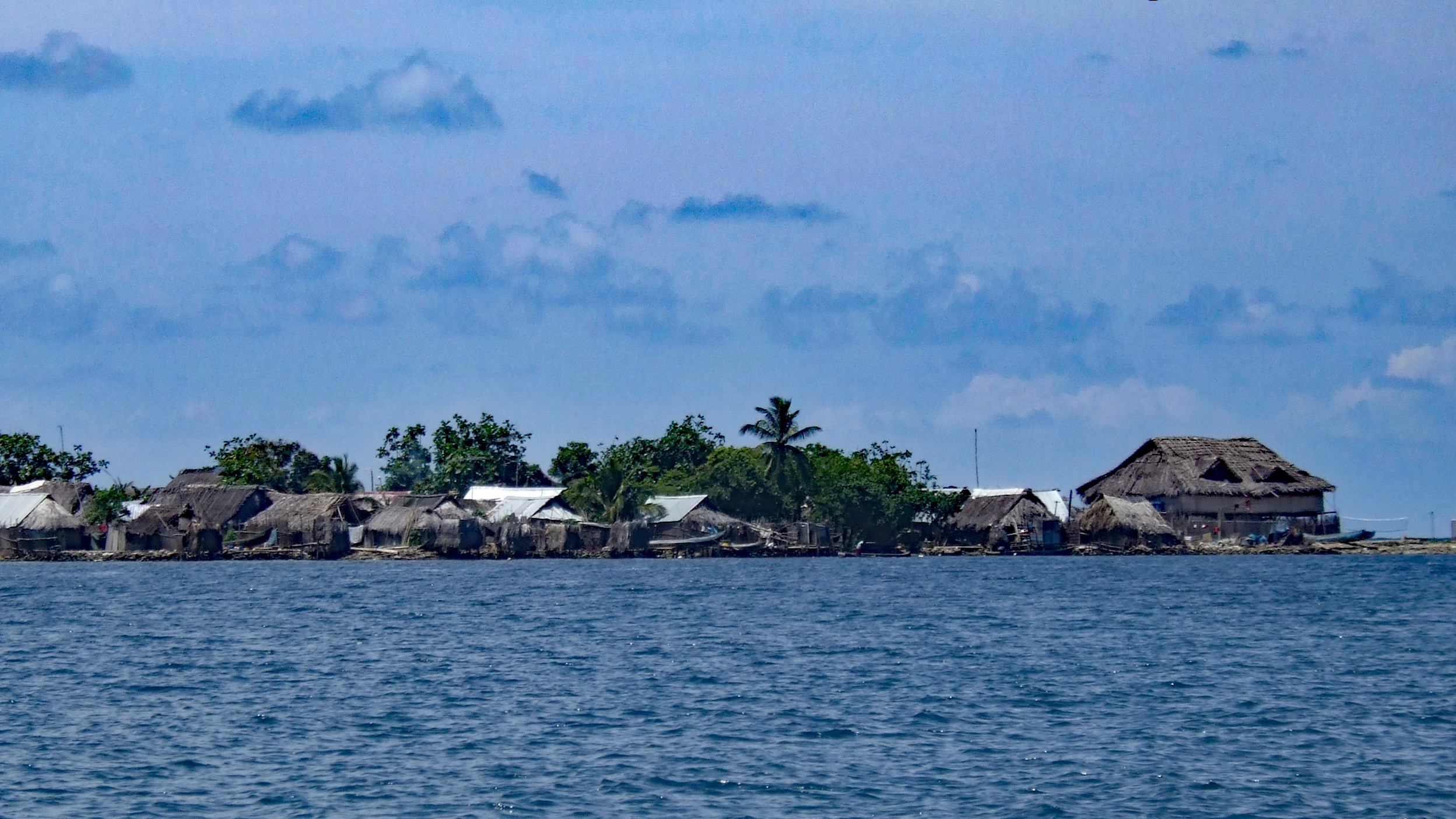 Maison, eau, ile, palmier